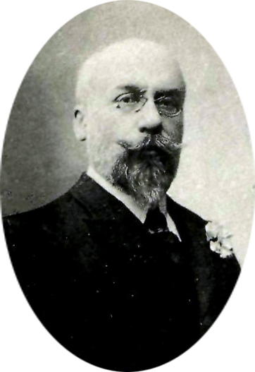 Пильчиков, Николай Дмитриевич